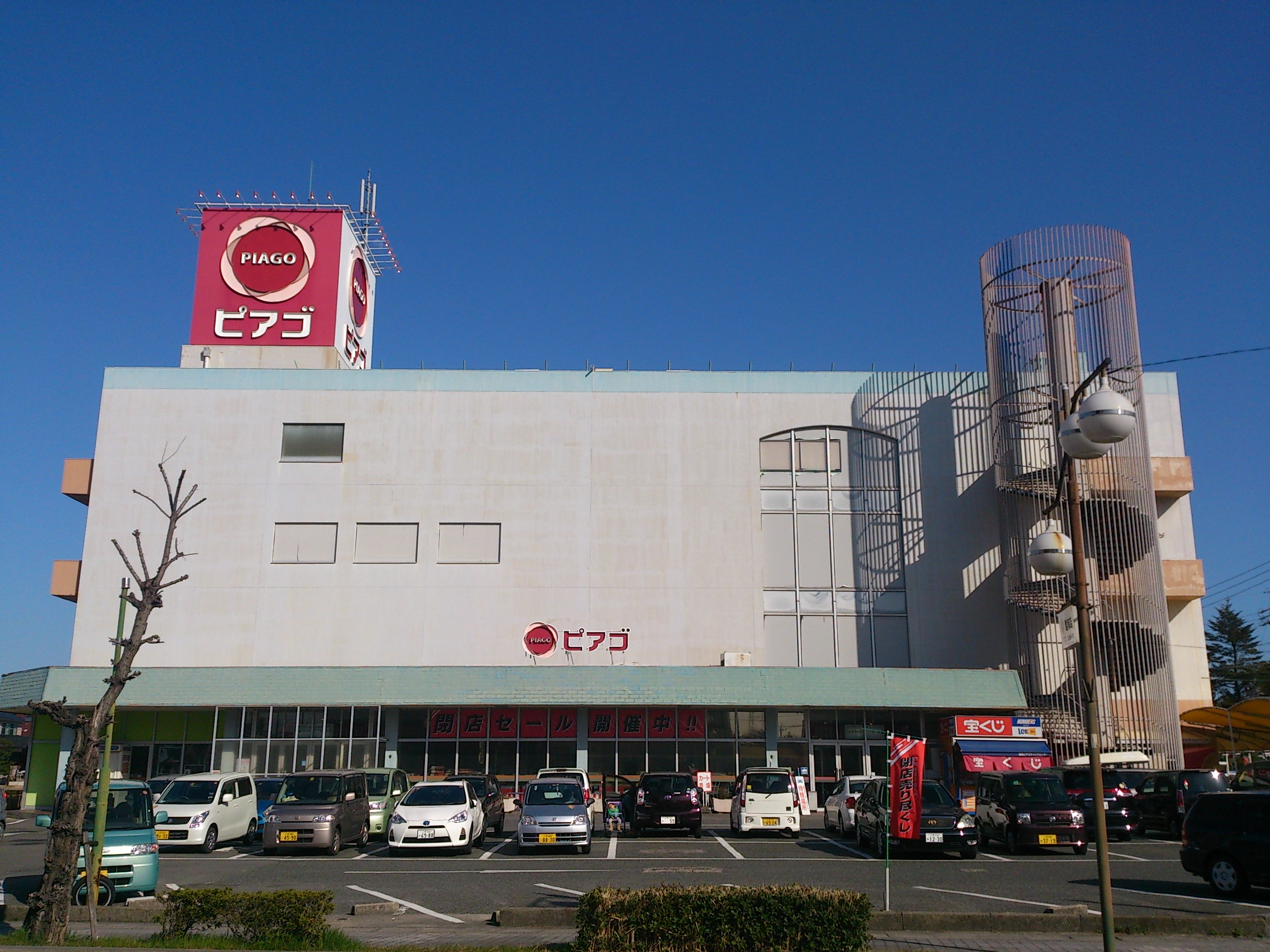 ピアゴ碧南店外観